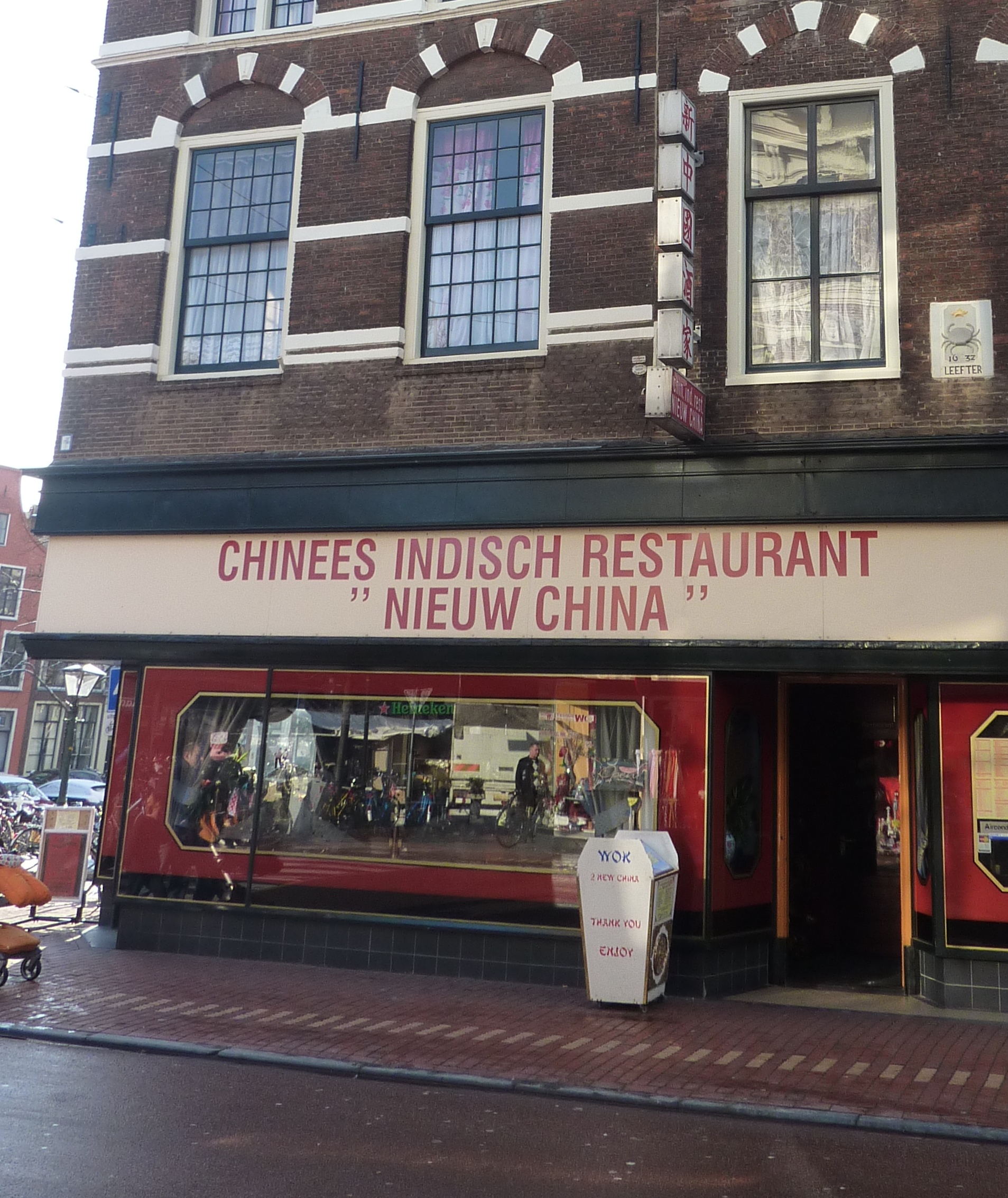 Leiden - Breestraat 177 - Chinees Indisch restaurant - RM24628